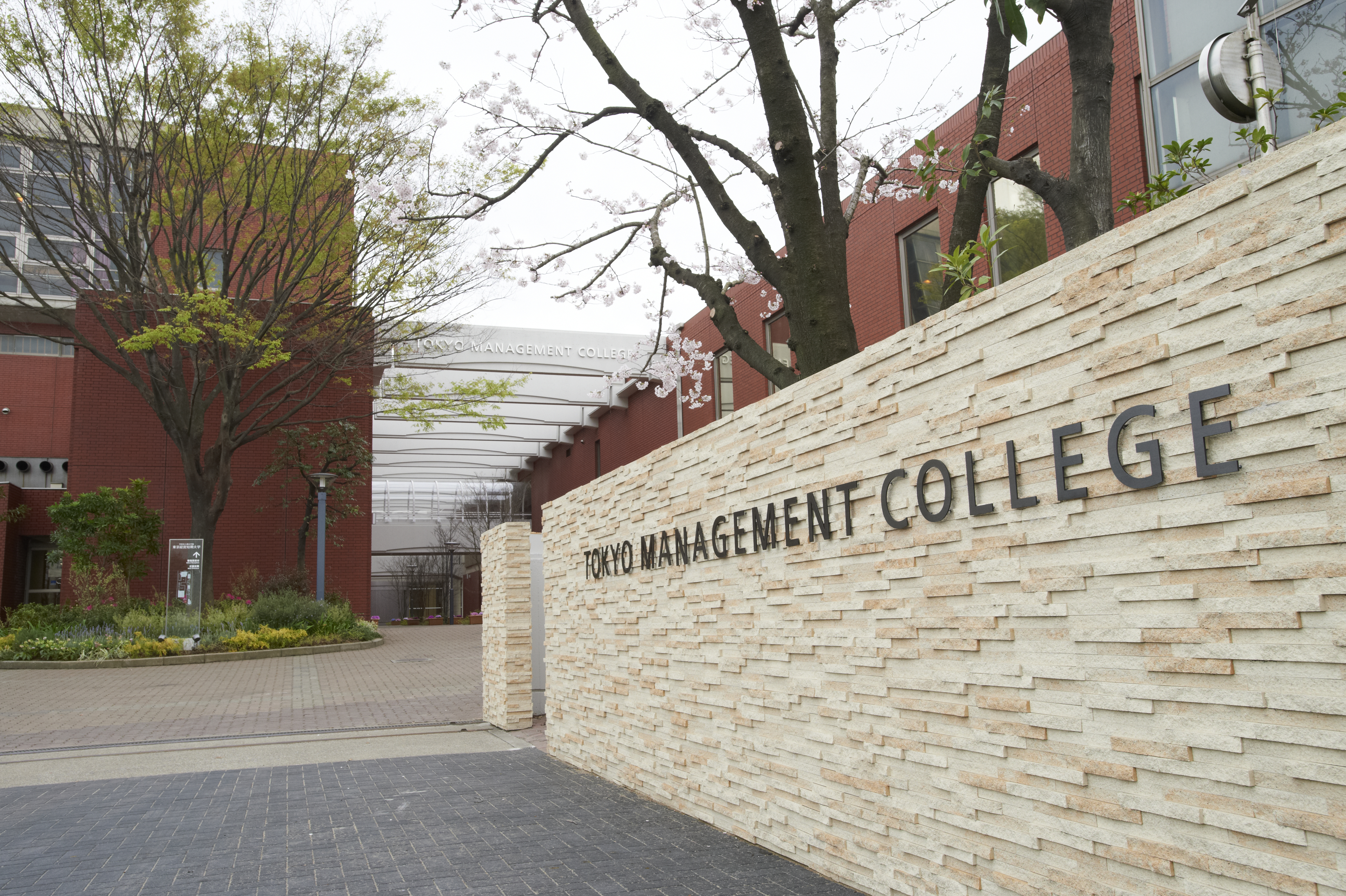 東京経営短期大学外観